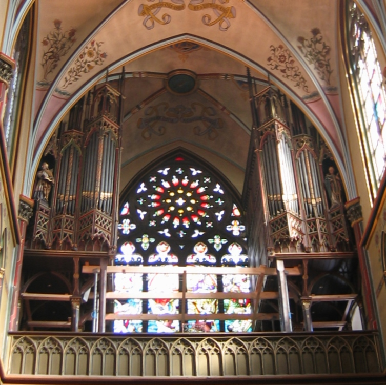 "Open Monumentendag" Amsterdam De kerk is oorspronkelijk gesticht als kapel van het klooster van de paters Redemptoristen aan Keizersgracht 218. Naast het in 1850 gebouwde klooster verrees in de jaren 1852- 1854 het huidige neogotische kerkgebouw. Zowel klooster als kerk werden gebouwd naar ontwerp van Th. Molkenboer. De kerk heeft de grondvorm van een driebeukigekruis- basiliek met een vijfzijdig gesloten koor met zijkapellen en is geïnspireerd op de Franse gotiek uit de dertiende eeuw. Het interieur werd aanvankelijk wit gestukadoord opgeleverd; vanaf 1881 werd het voorzien van een rijk uitgevoerde beschildering en inventaris. In de meeste gevallen leverde het atelier van F.W. Mengelberg hier- voor het ontwerp. De glas-in-loodramen zijn van de hand van J.B. Capronnier en van het atelier Nicolas. In de periode 1995-1997 werd het gebouw ingrijpend hersteld en gerestaureerd. De kerk wordt gebruikt voor katholieke erediensten van diverse kerkgenootschappen.